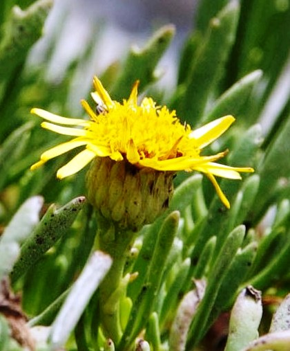 Limbarda crithmoides (L.) Dumort. Favignana, Sicily